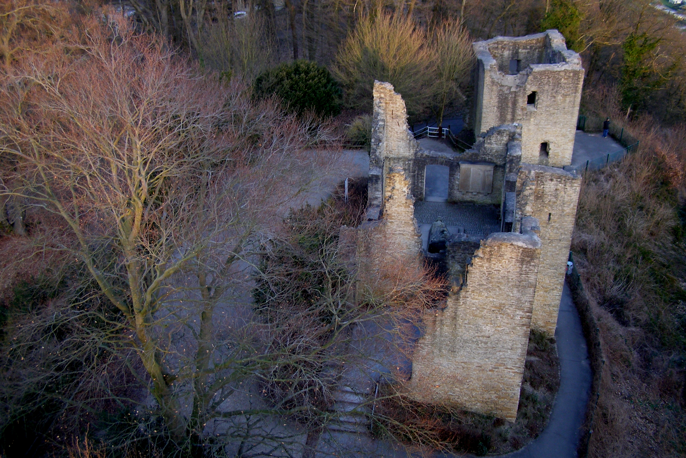 Blick vom Vincketurm zur Ruine Hohensyburg, Dortmund-Syburg